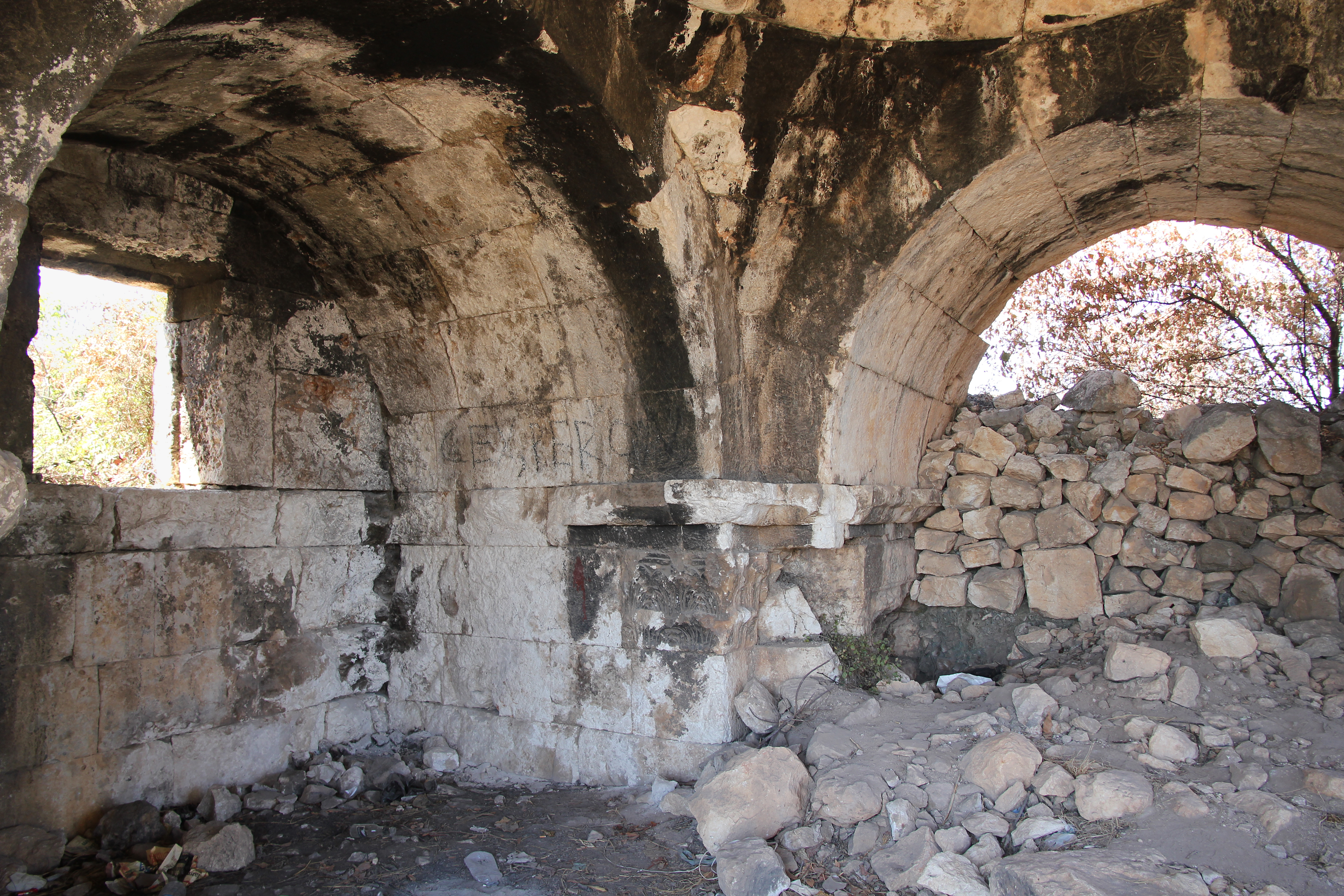 Akkale, byzantinischer Ruinenkomplex bei Kızkalesi, Südtürkei, Inneres des kreuzförmigen Gebäudes